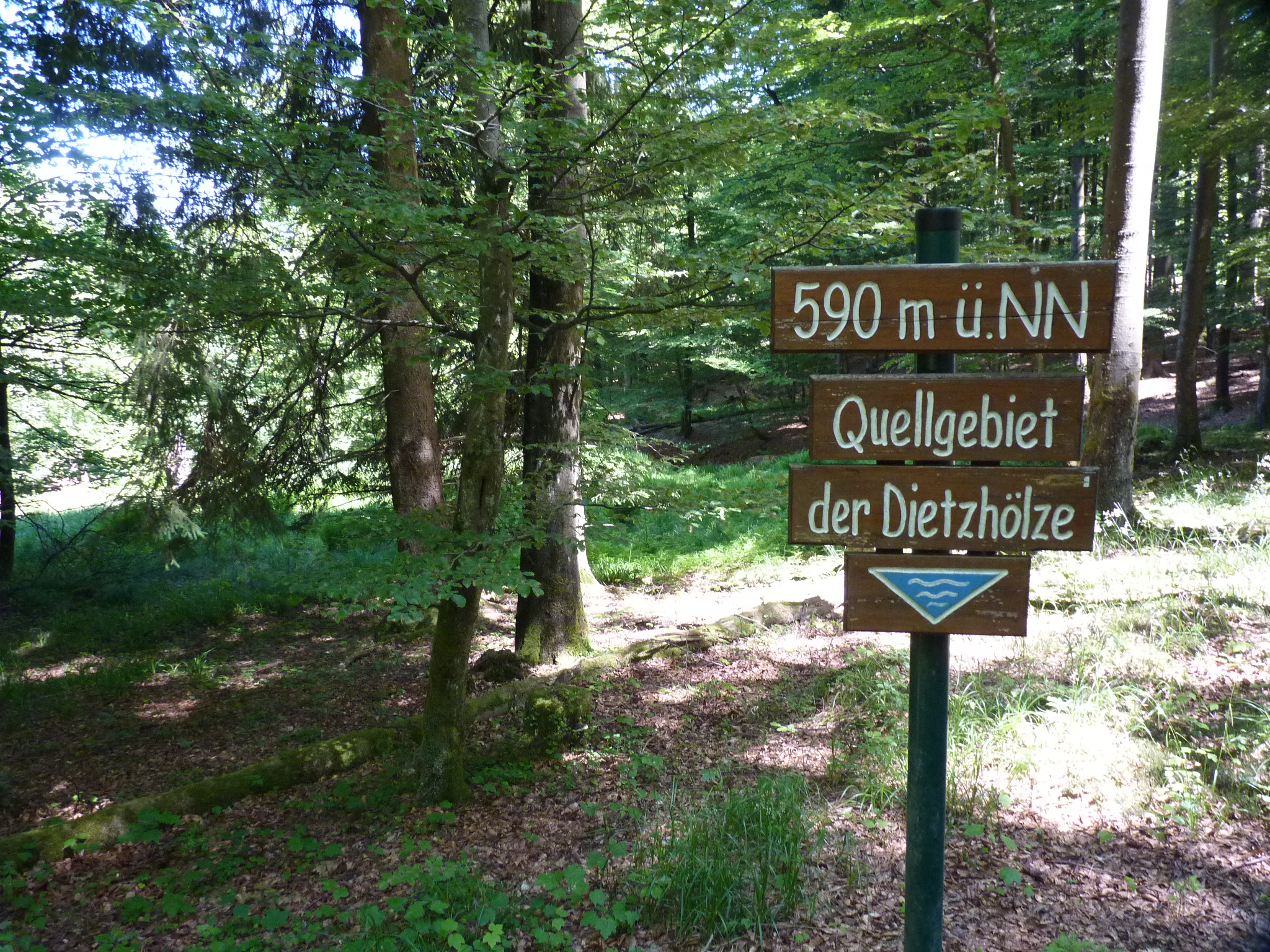 Hinweisschild im Dietzhölz-Quellgebiet (2015)